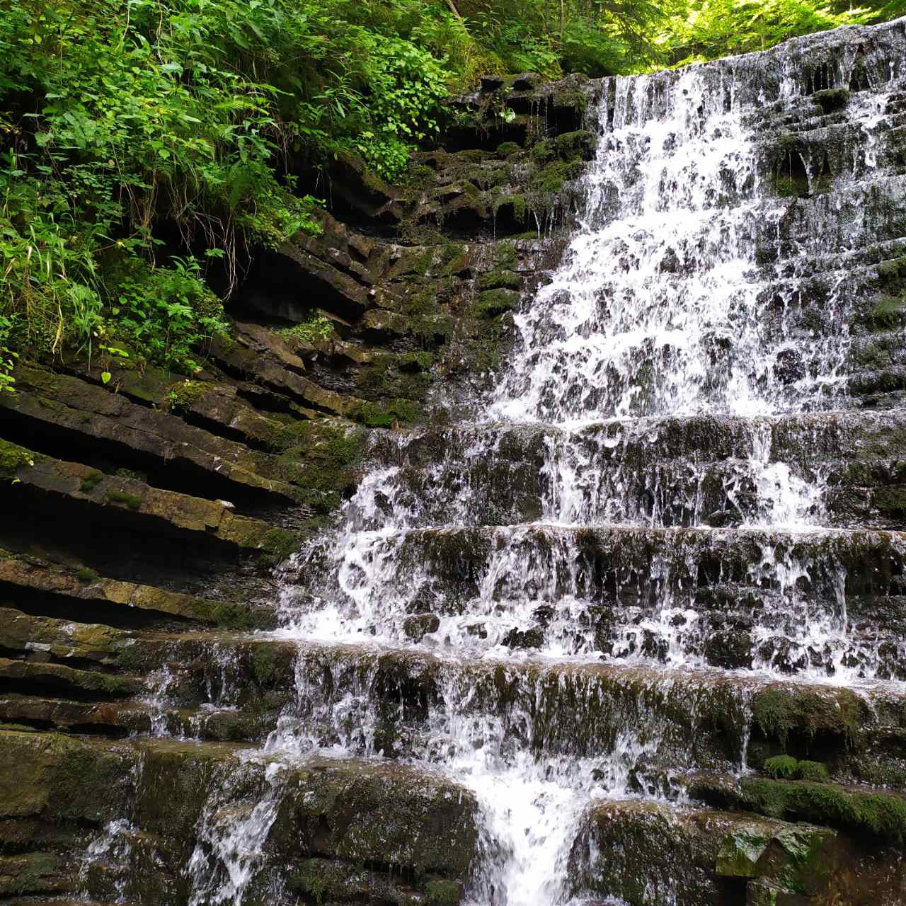 Кудринецький водоспад (Івано-Франківська область, Надвірнянський район)